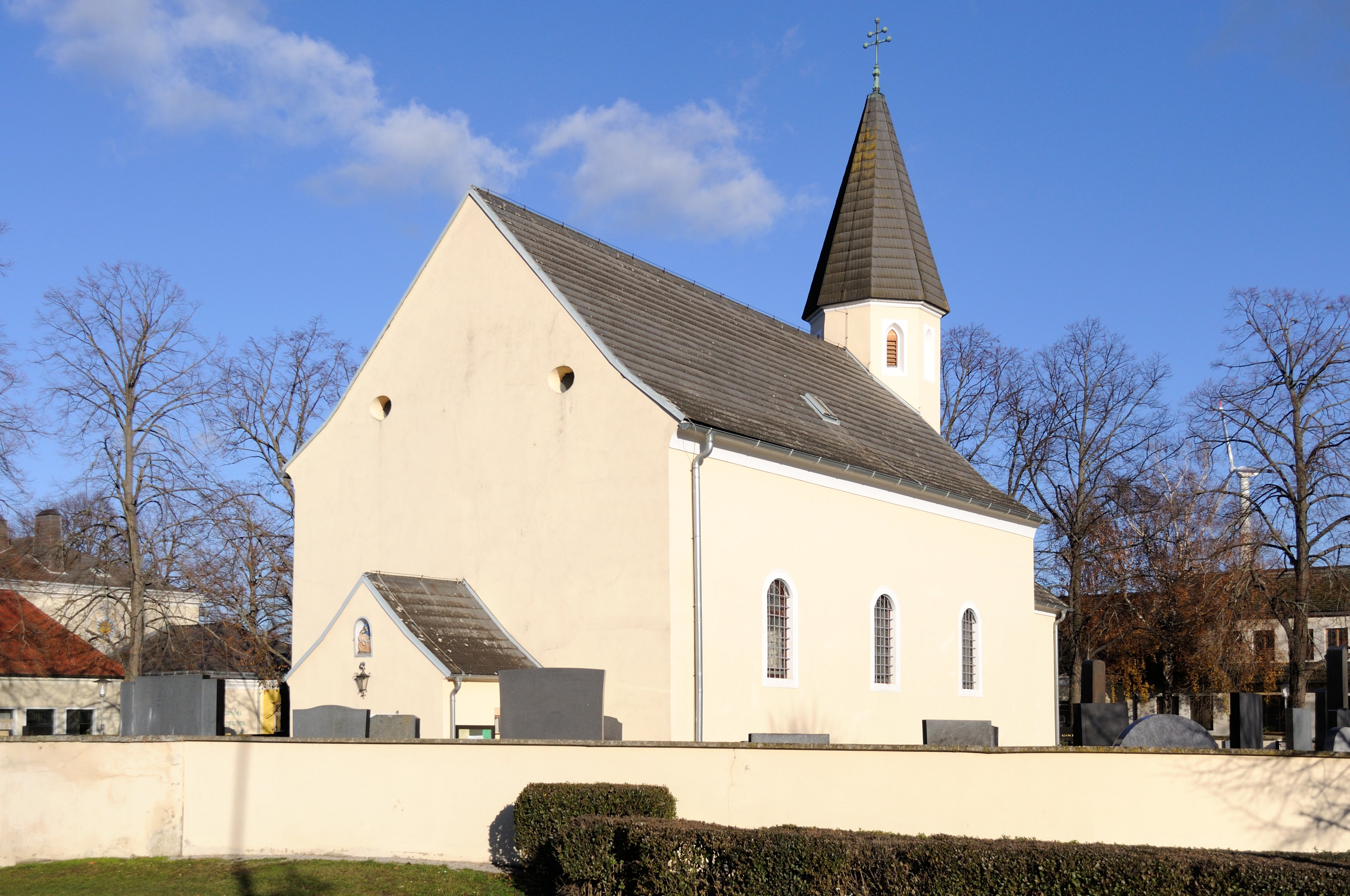 Kath. Filialkirche hl. Katharina in Glinzendorf